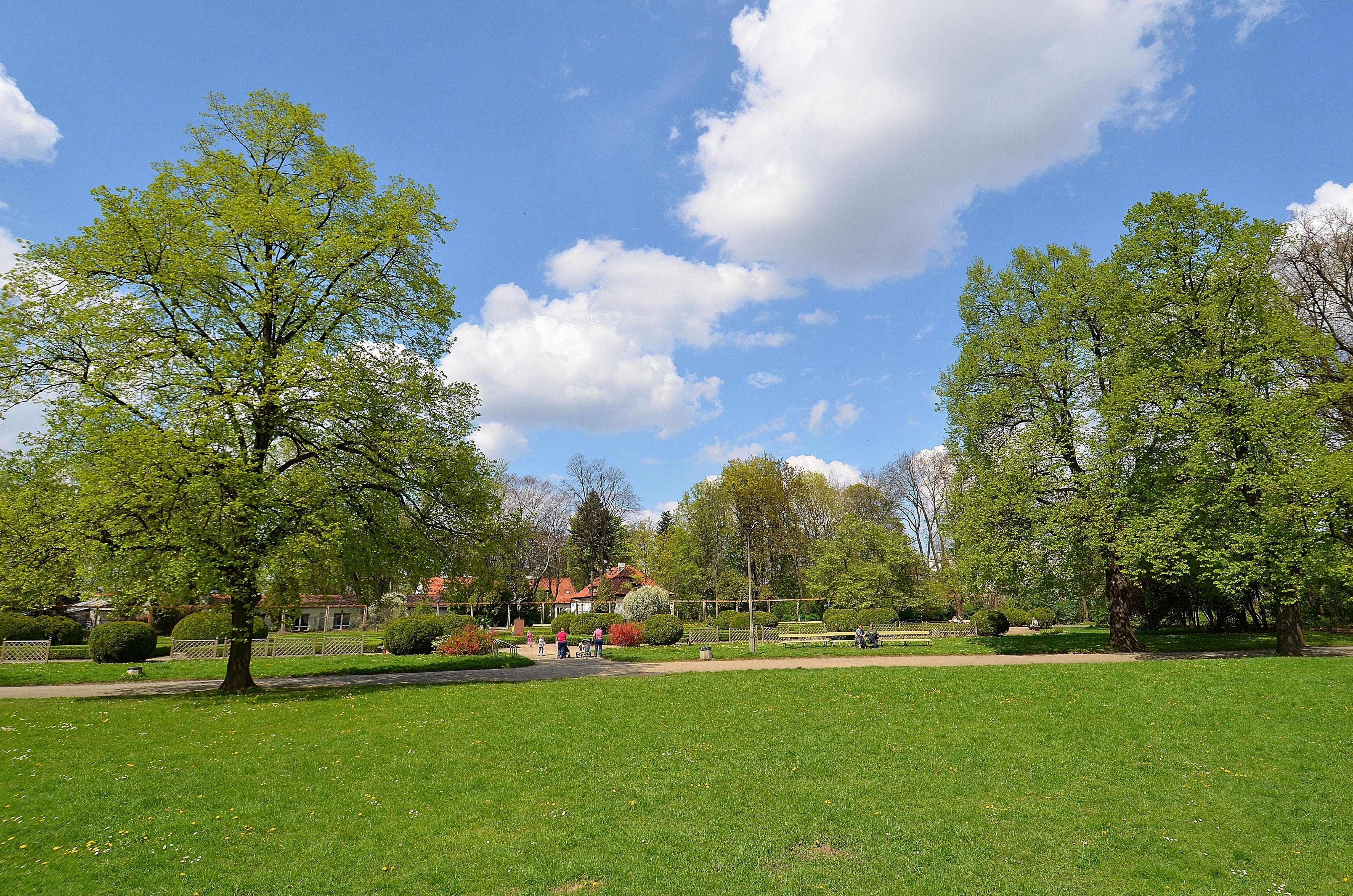 Park Skaryszewski w Warszawie